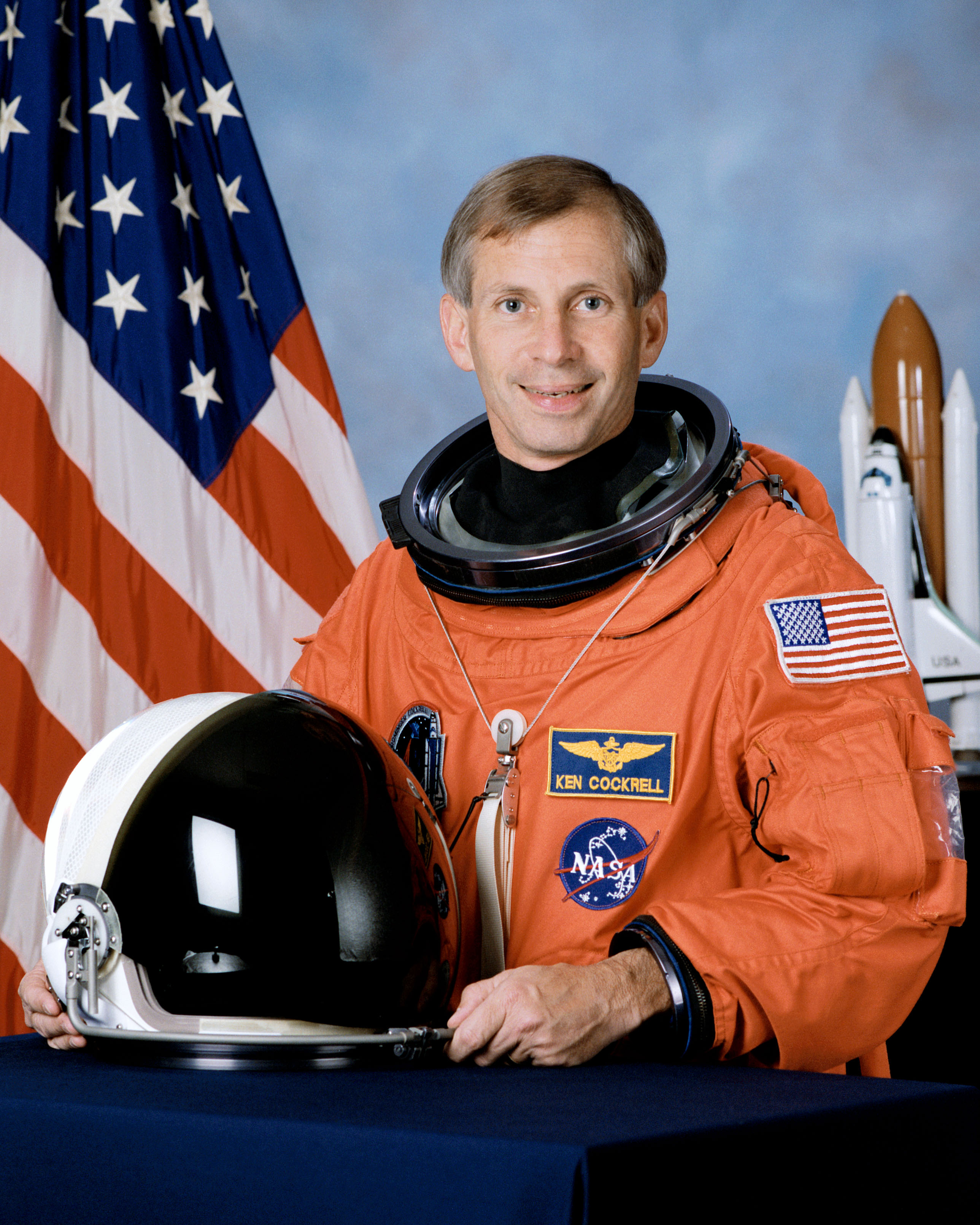 portrait astronaut kenneth cockrell